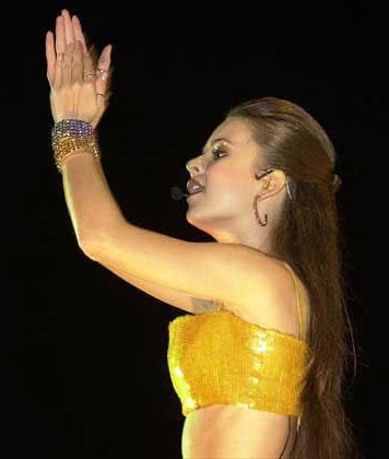 Sandy se apresentando no Rock In Rio III, janeiro de 2001.